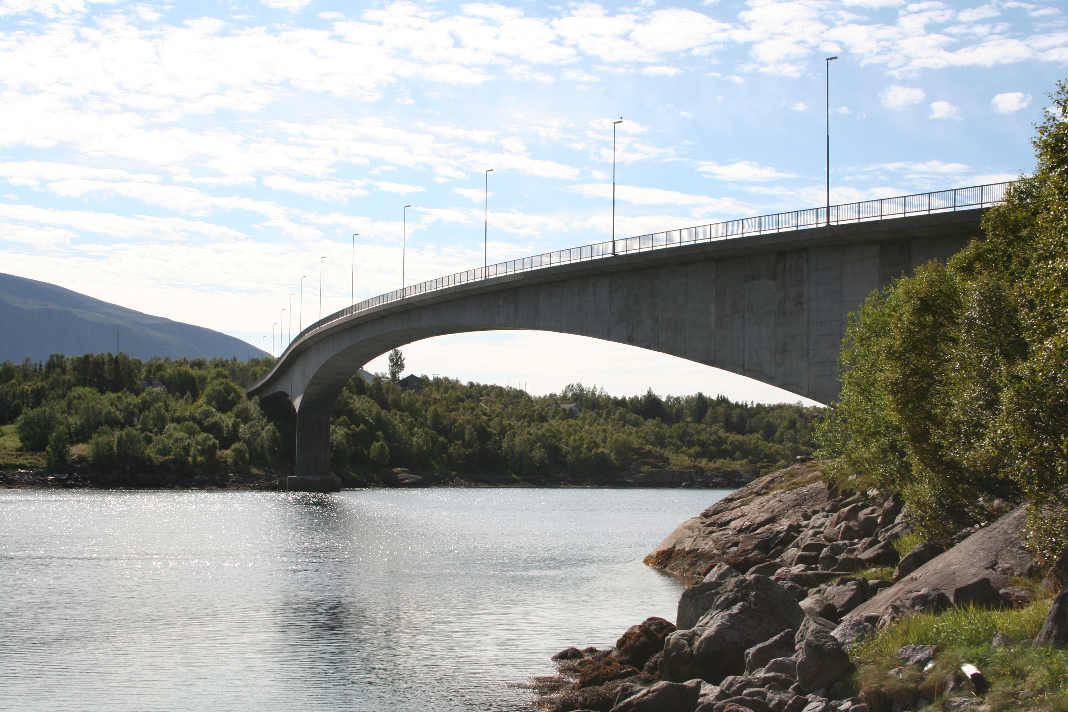 Djupfjordstraumen Bridge in Sortland, Norway